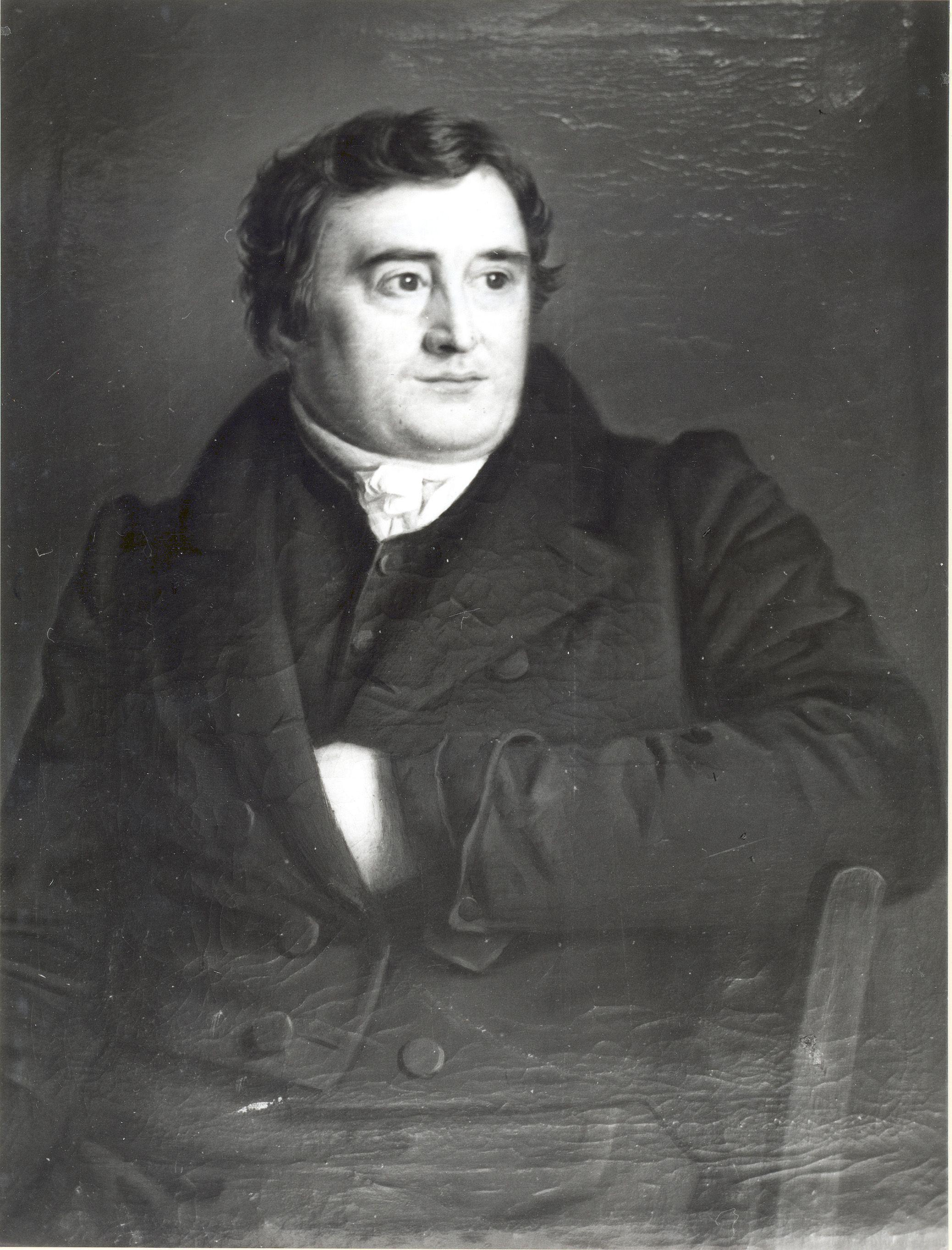 Arent van Halmael (Amsterdam, 17 oktober 1788 - Ljouwert, 29 septimber 1850)